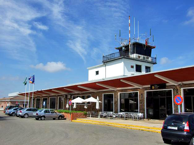 Aeropuerto de Córdoba